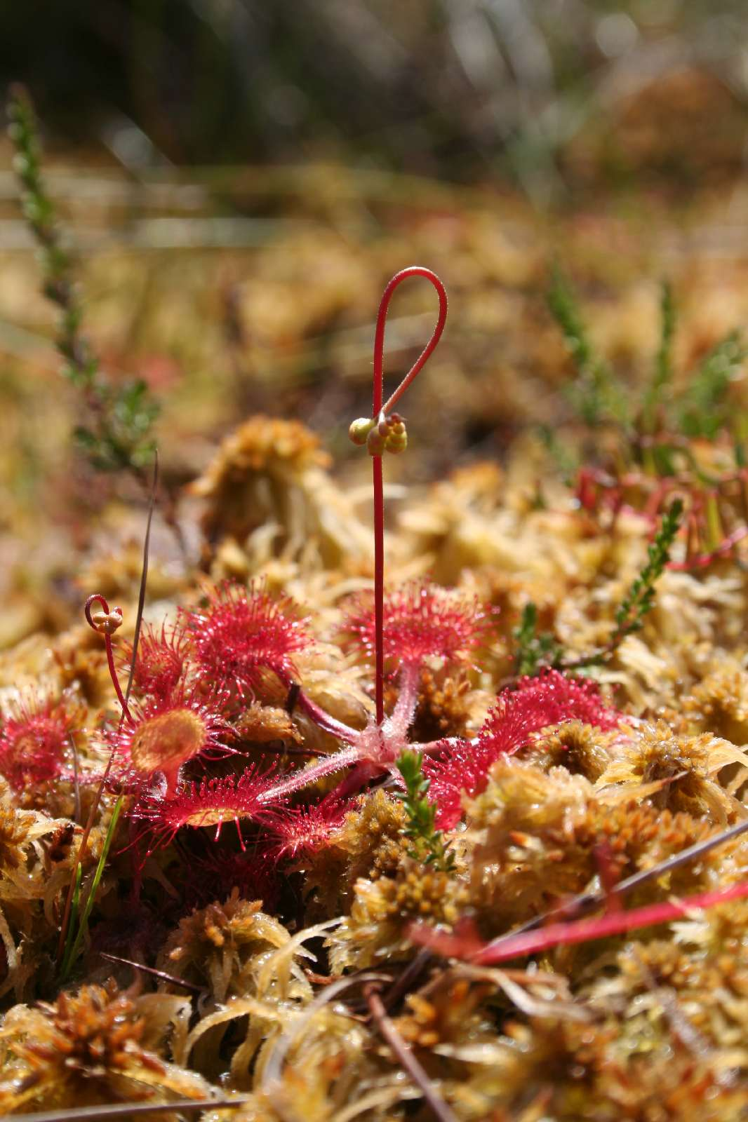 Rundblättrige Sonnentau (Drosera rotundifolia) im NSG Buddenhagener Moor, Mecklenburg-Vorpommern.